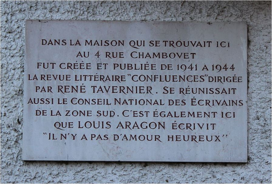 Plaque commémorative aposée au n° 4 de la rue Chambovet, Lyon 3, France rappelant l’existence d’une maison où a été créé en 1940-1944 par René Tavernier la revue Confluences et par Louis Aragon la chanson Il n’y a pas d’amour heureux.